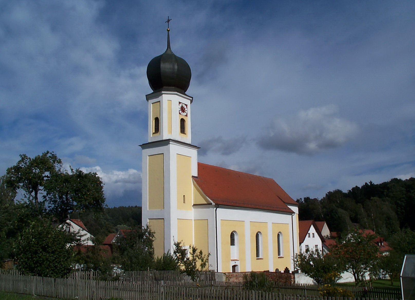 Birnbach 22. Kath. Kirche St. Klemens, Saalbau mit eingezogenem Chor, abgewalmtem Satteldach und mittlerem Fassadenturm mit Zwiebelhaube und Putzgliederungen, 1720; mit Ausstattung.